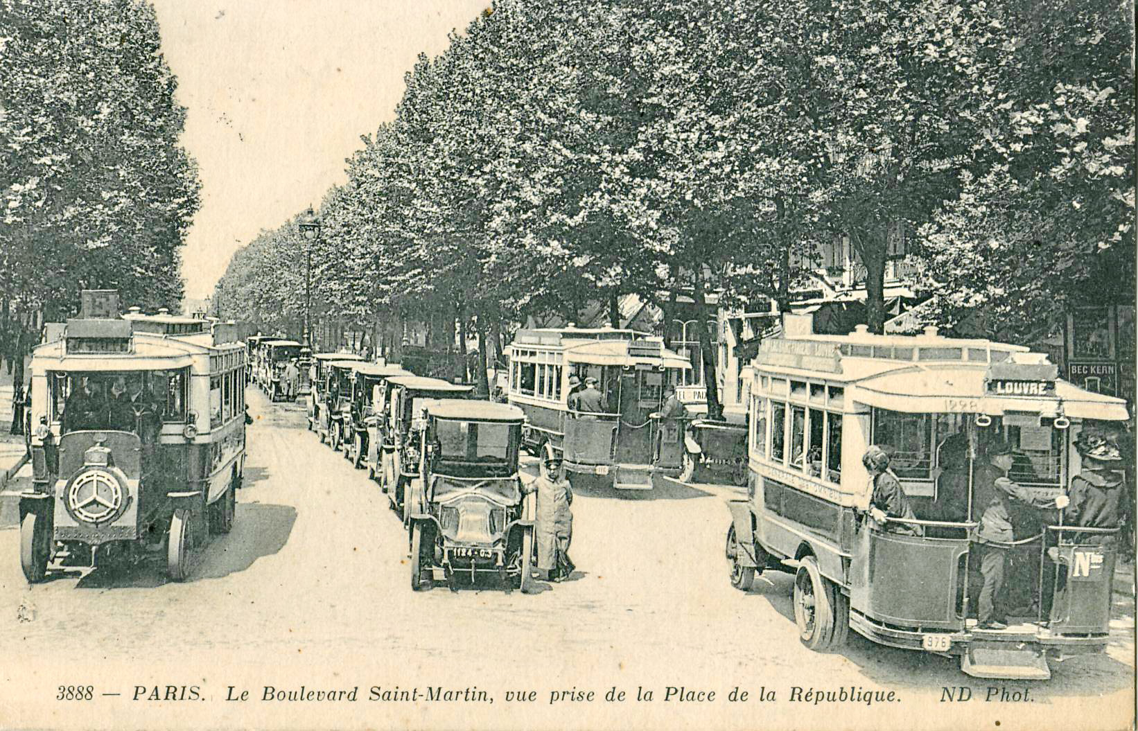 Carte postale ancienne éditée par ND n°3888 : Paris - Le boulevard Saint-Martin, vue prise de la Place de la République.